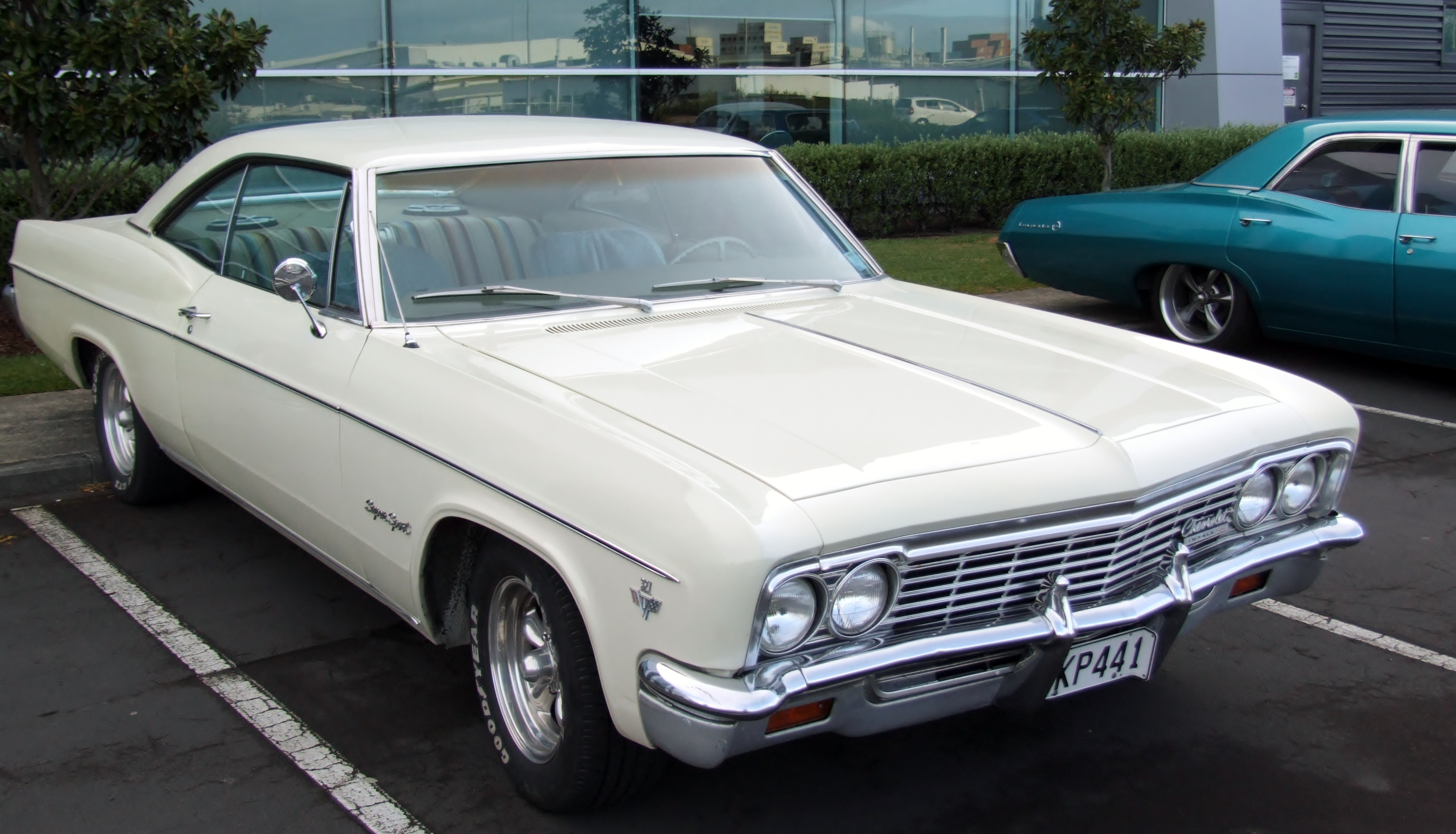 1966 Chevrolet Super Sport